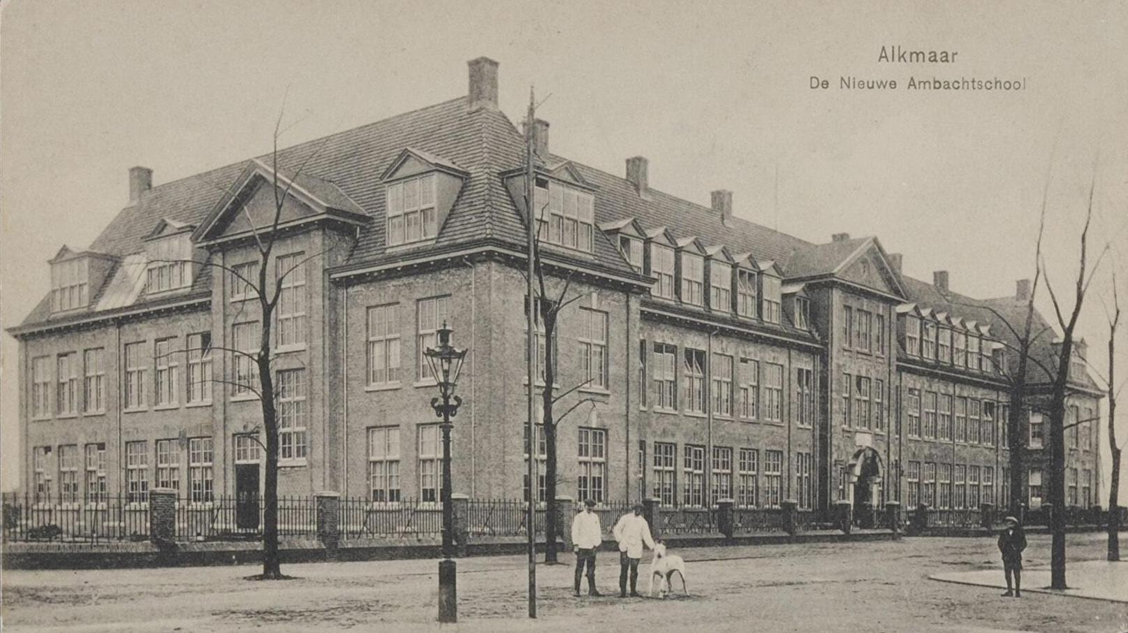 Nieuwe Ambachtsschool in Alkmaar rond 1913. Huist sinds 2011 het Regionaal Archief Alkmaar